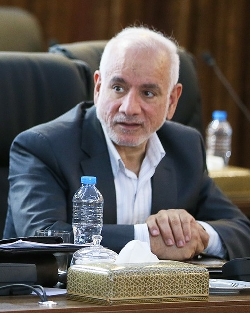 جلسه مجمع تشخیص مصلحت، ۱۳ مرداد ۱۳۹۷